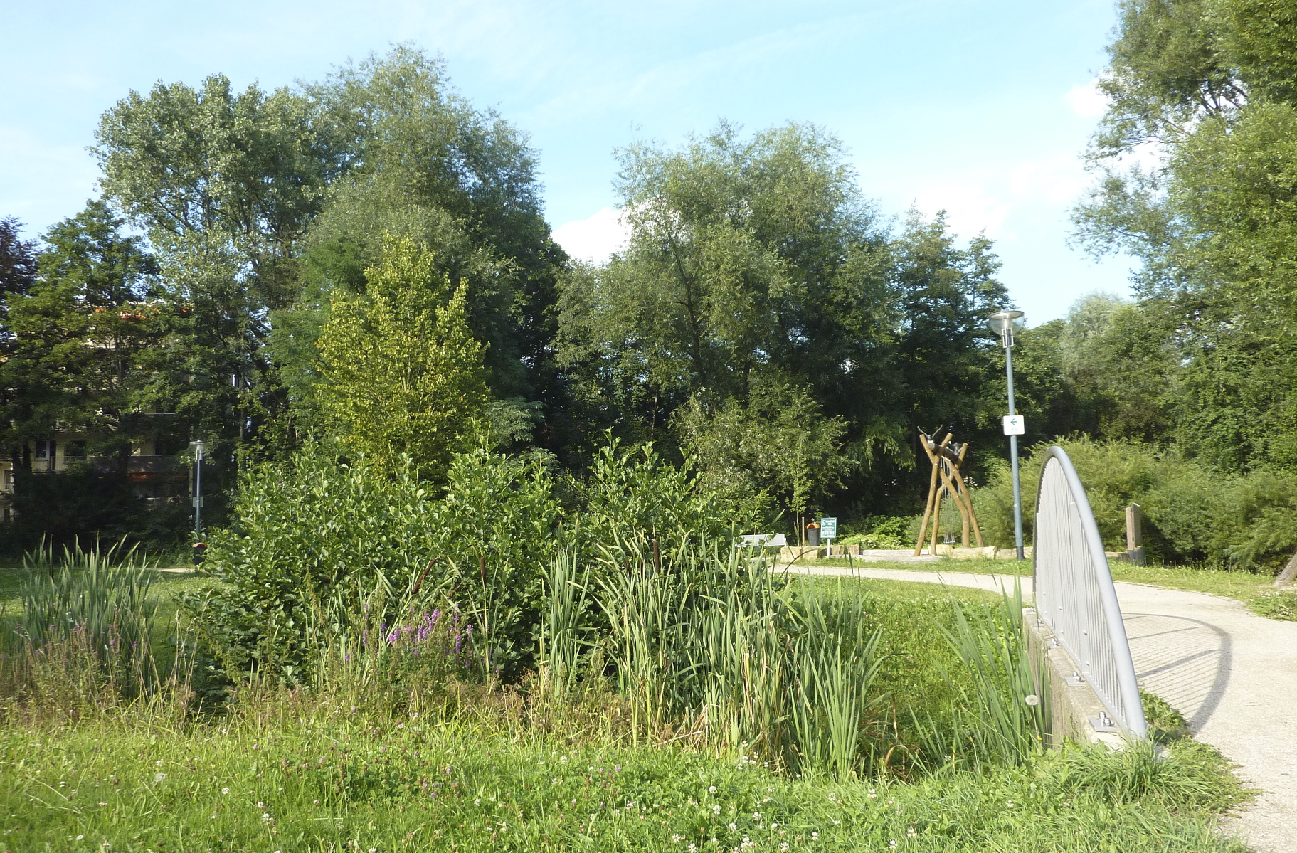 Neu-Isenburg bei Frankfurt am Main, Hessen: Die Bansamühle war eine im Jahr 1705 am Königsbach/Luderbach errichtete Wassermühle mit dazugehörigem barockem Wohnhaus. Die Mühle erhielt ihren Namen nach der Frankfurter Bankiersfamilie Bansa, die das Anwesen im Jahr 1766 aufgekauft hatte. Das Foto zeigt eine Ansicht des im 20. Jahrhundert angelegten, zum Anwesen gehörenden Bansaparks